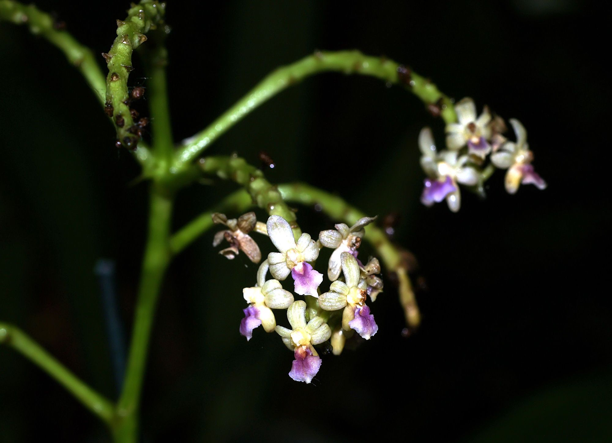 Sarcophyton pachyphyllum